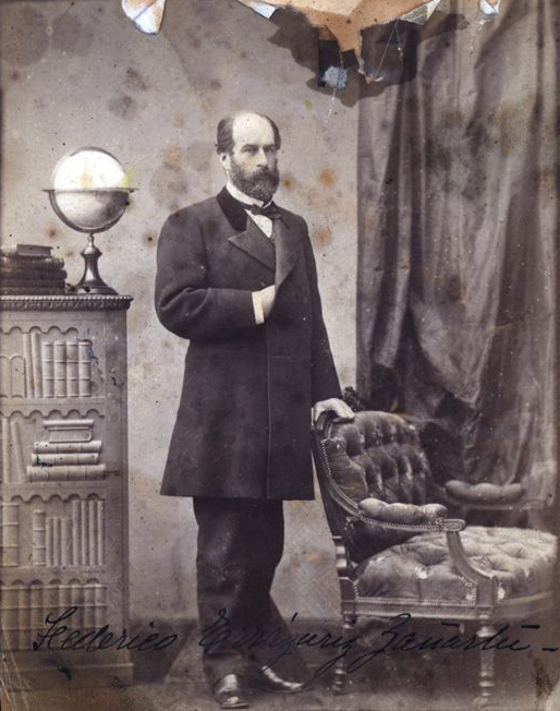 Federico Errázuriz Zañartu, 1825-1877